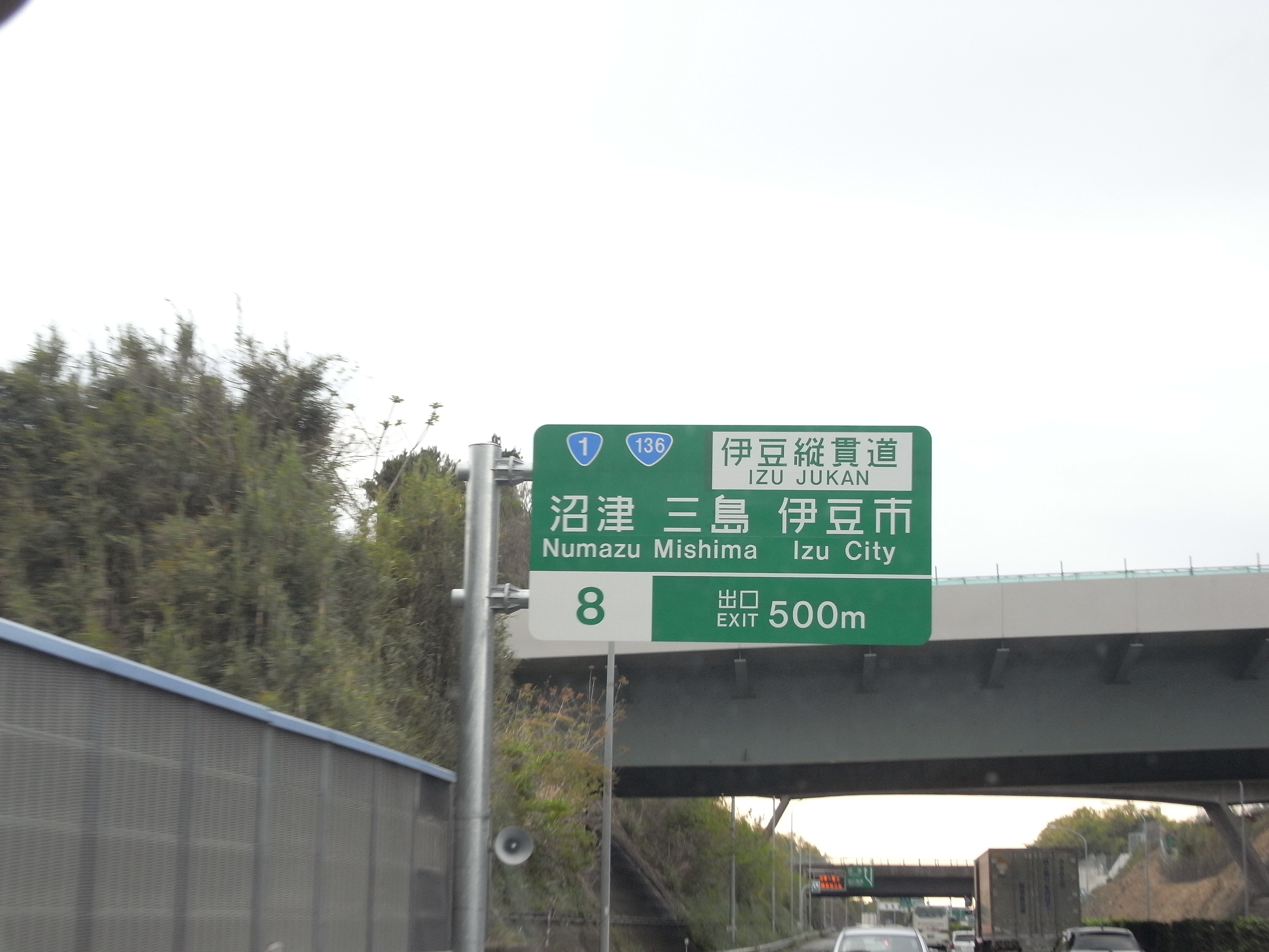 東名高速道路沼津IC、下り線出口標識